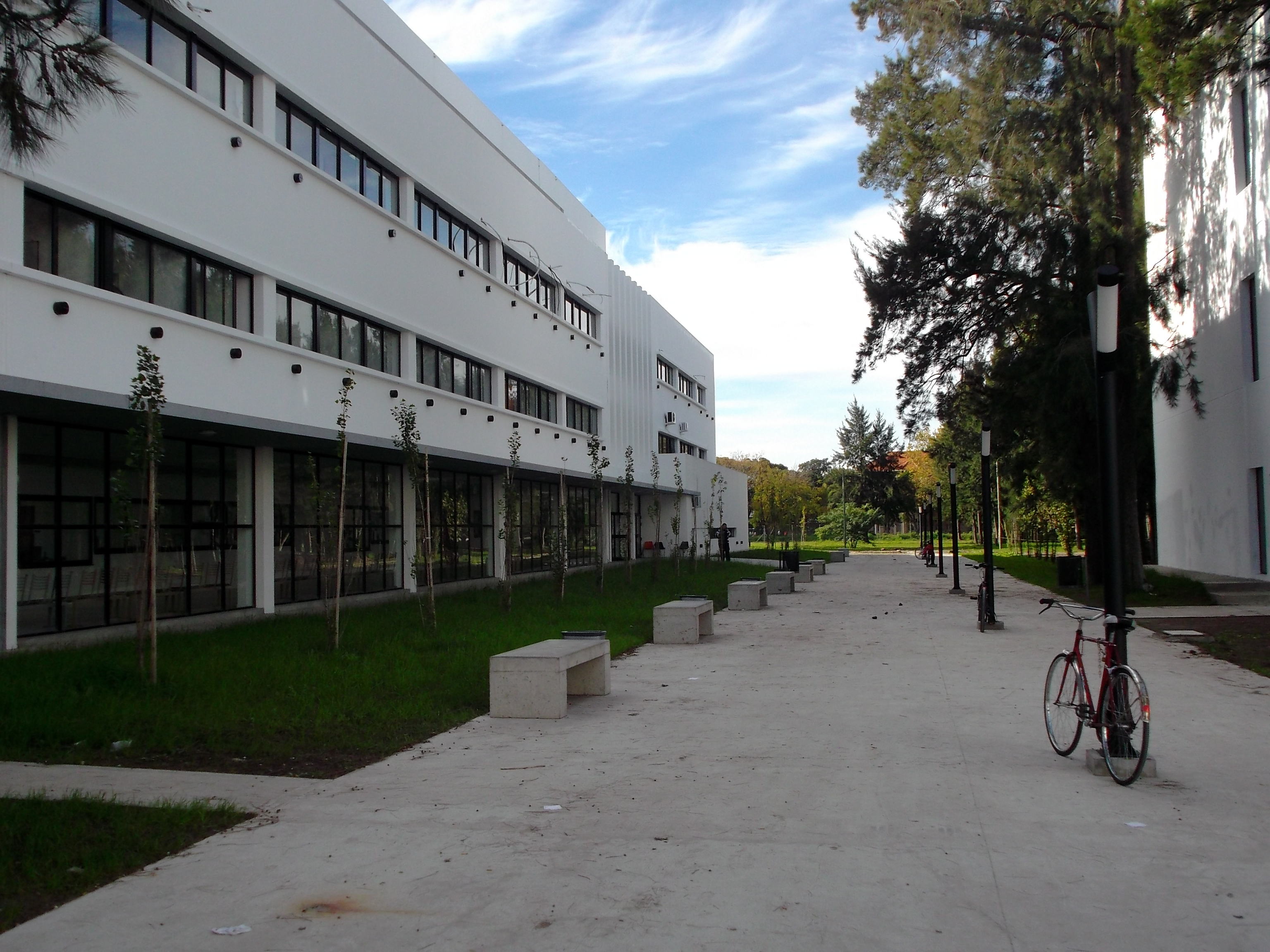 Pasaje peatonal y nuevo edificio de la Facultad de Humanidades y Ciencias de la Educación (UNLP). Fotografia: Eric Hamilton